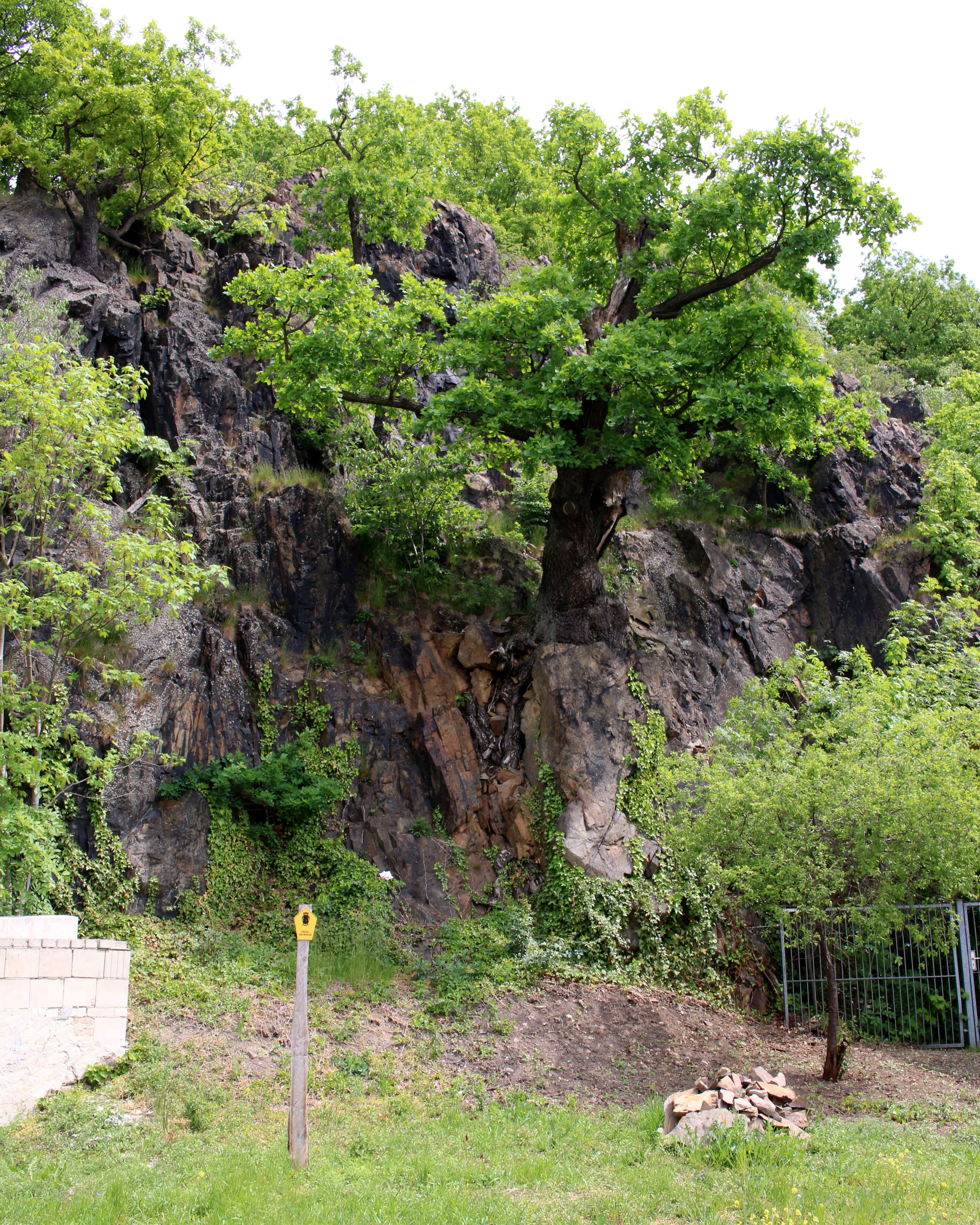 Der Eulenfelsen ist ein geologischer Grauwacke-Aufschluss auf der Flur der sächsischen Stadt Kamenz, der als Flächennaturdenkmal unter Schutz steht.